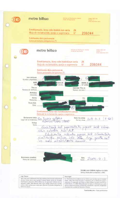 Erreklamazio-orri bat beteta. Metro Bilbao.